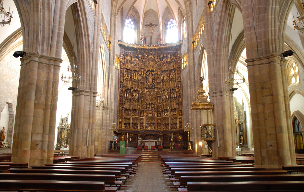 Nave central, cabecera y retablo mayor de la Basílica de la Asunción de Nuestra Señora de Lequeitio (Vizcaya, País Vasco, España)